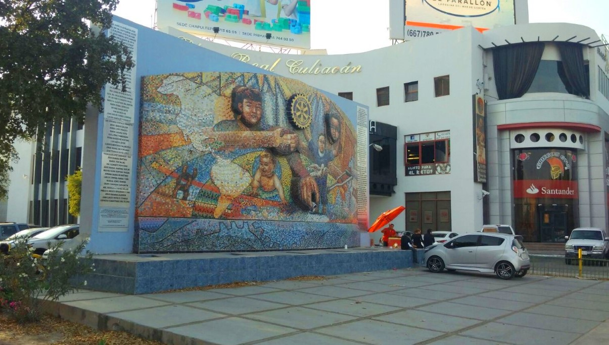 Obra realizada con la tecnica mosaico